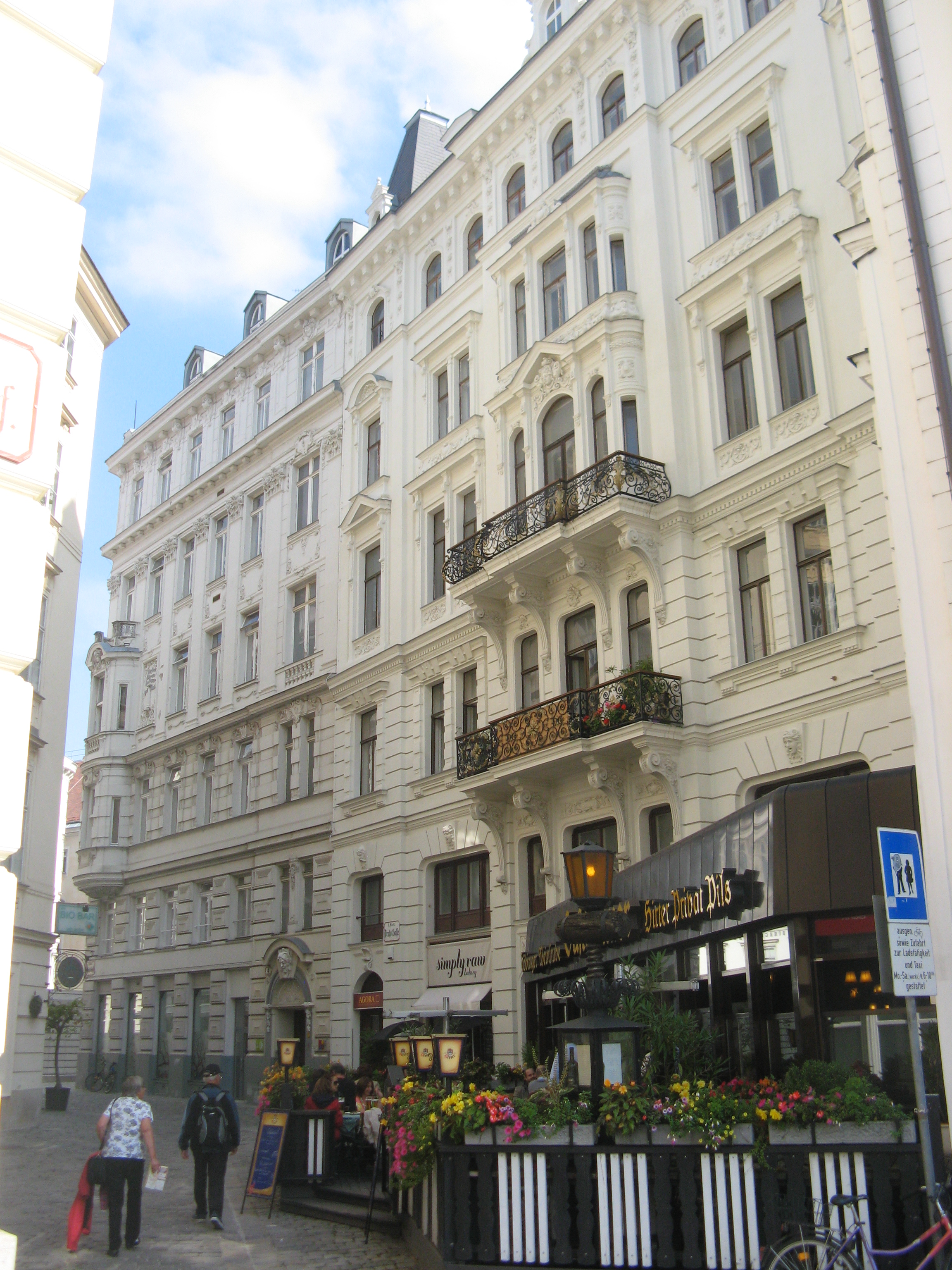 Drahtgasse 2 (1881-1882) von Franz von Neumann, Wien-Innere Stadt